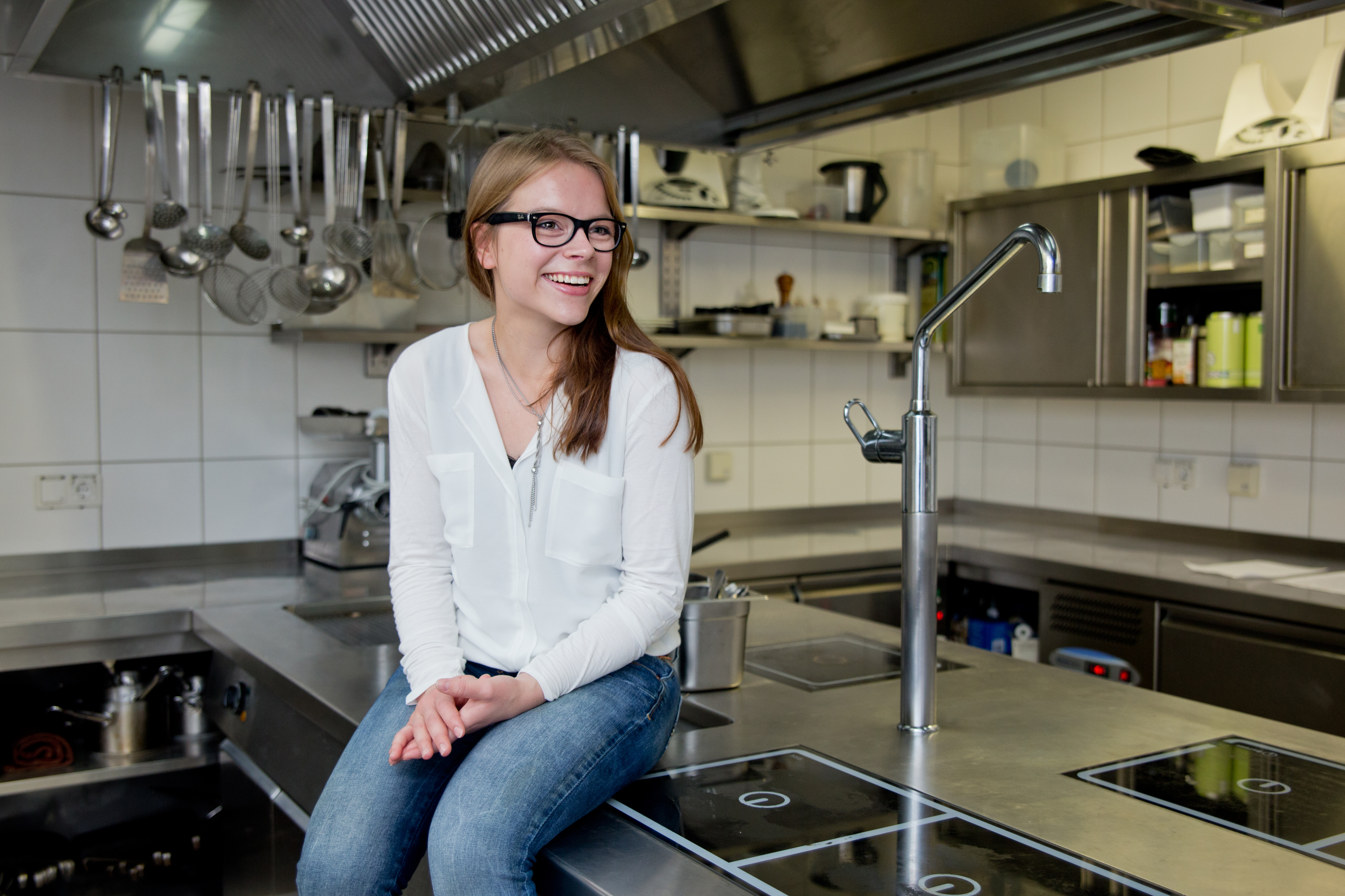 Die Foodjournalistin und Kochbuchautorin Stefanie Hiekmann sitzt im August 2017 in einer Restaurantküche in Osnabrück.